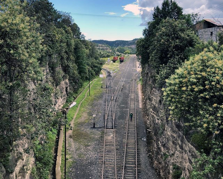 Estacion San Rafael, Chihuahua.